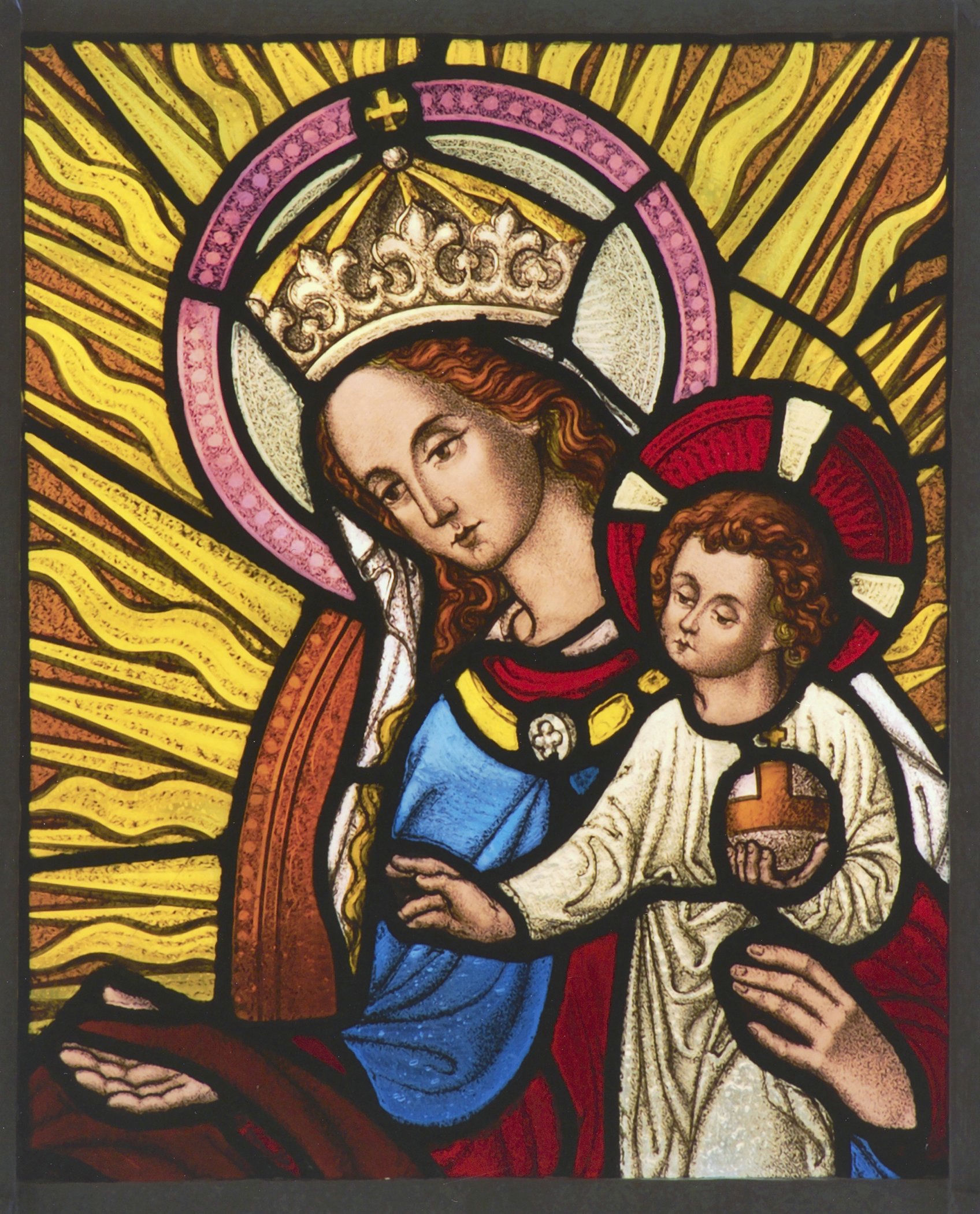 Karmelietenklooster: Interieur, glas-in-loodraam: Maria en kind